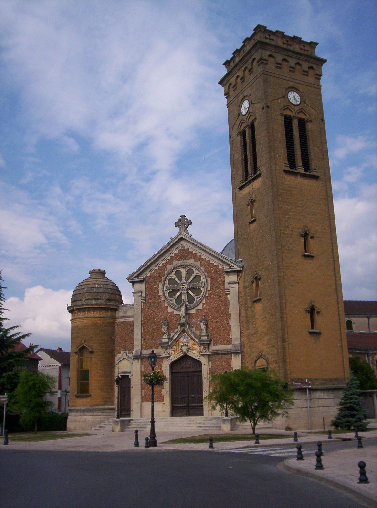 Église de Magenta, Marne (France).